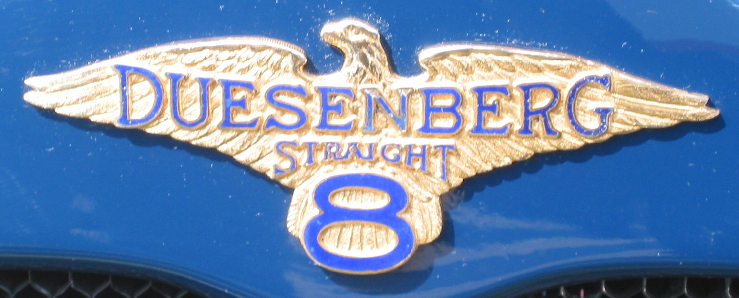 Emblem an einem Duesenberg X Straight 8 von McFarlan von 1927.